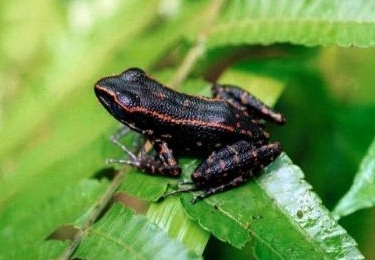 Hylarana siberu